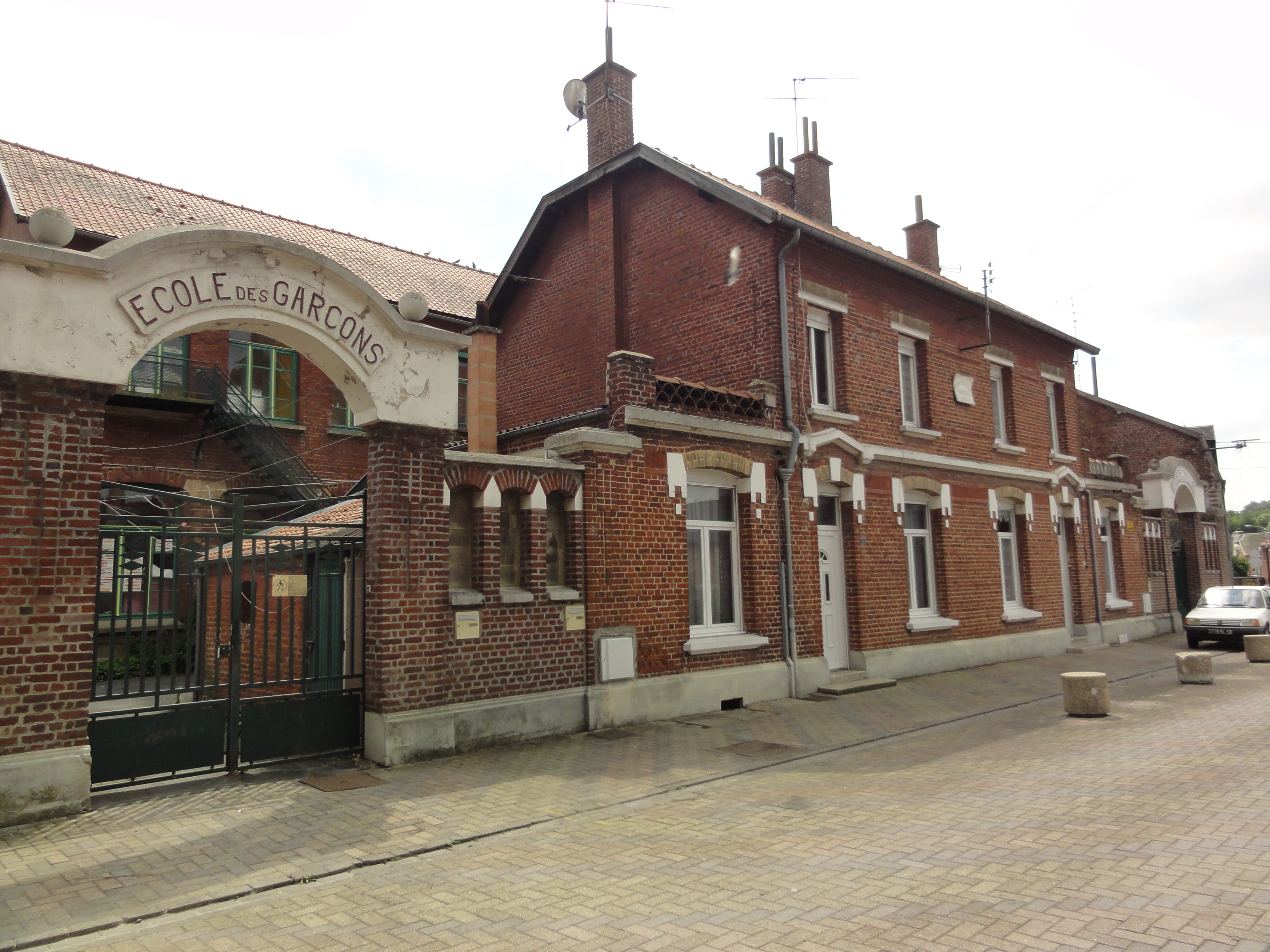 Haussy (Nord, Fr) anciennes écoles.